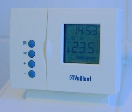 Elektronischer Heizugsregler mit Tag- und Wochenprogramm